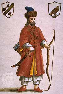 Марко Поло в восточной одежде. Средневековый рисунок, автор Giovanni Grevembrock, XVII-XVIII века.